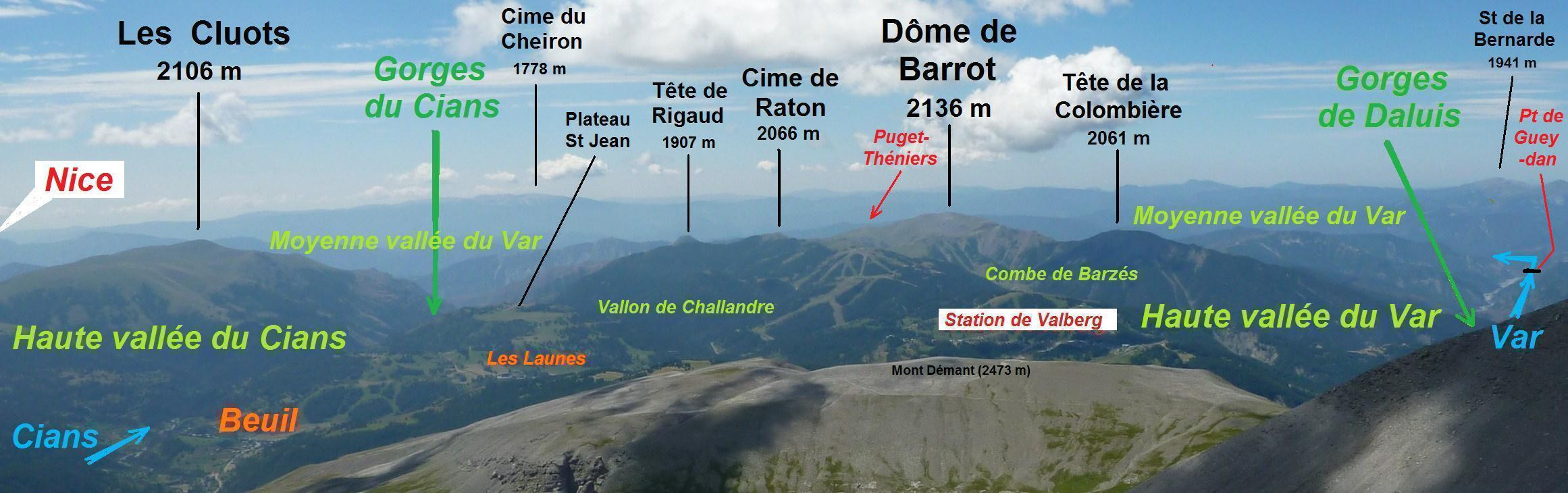 Vue panoramique légendée vers le sud sur le massif du "Dôme de Barrot" (2137 m) à partir du Mont-Mounier (2817 m) - 06 FRANCE. Photographie prise le 27/07/2010 et légendée par André Payan-Passeron le 21/01/2013.